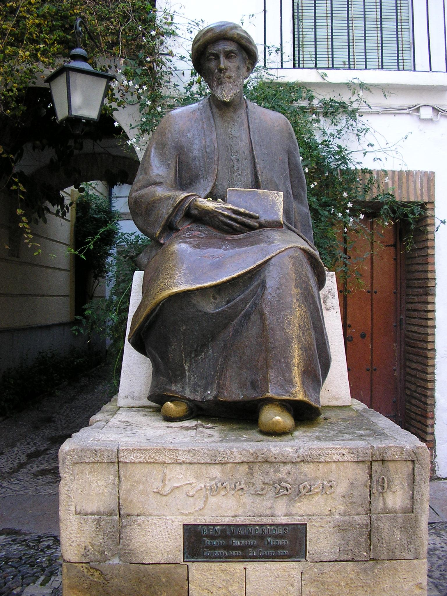 Escultura de Maimónides en la casa natal de Córdoba. Source: Makinal